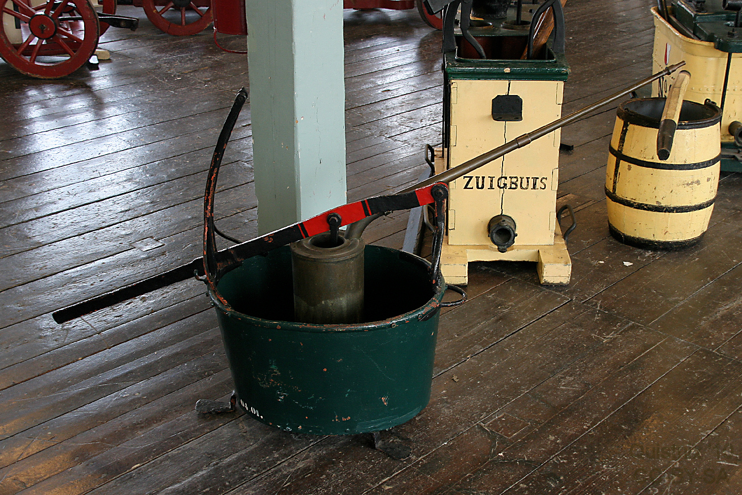 Brandspuit uit de 17e eeuw. Foto gemaakt in het Nationaal Brandweermuseum in Hellevoetsluis.